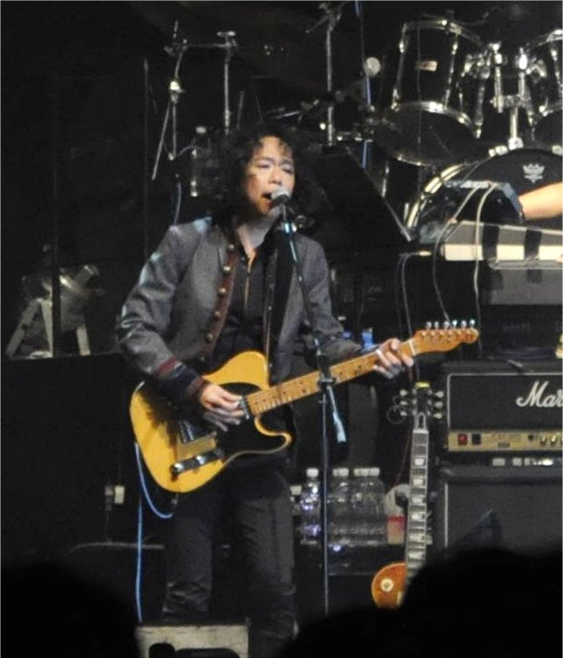 Joey Tang (鄧健明)